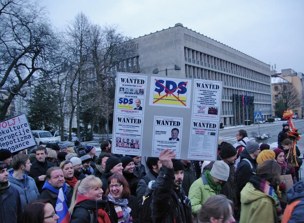 Tretja vseslovenska ljudska vstaja